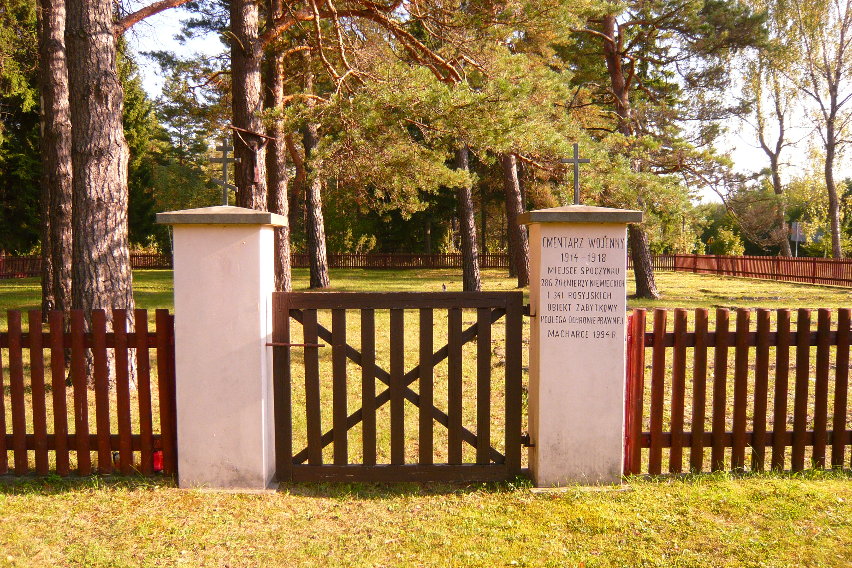 Cmentarz wojenny w Macharce